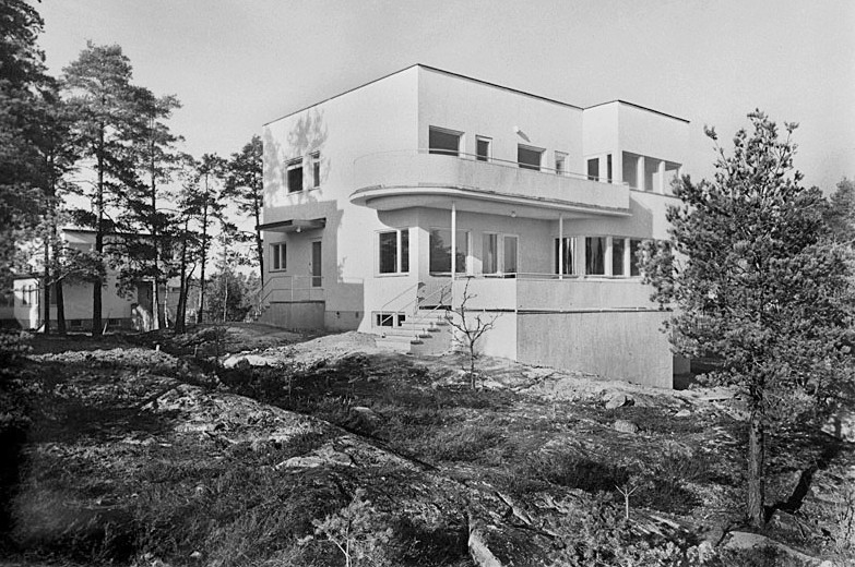 Börjesonsvägen 1, nybyggd villa på Ängbyhöjden i Södra Ängby. Kvartersnamn Parterren 1.